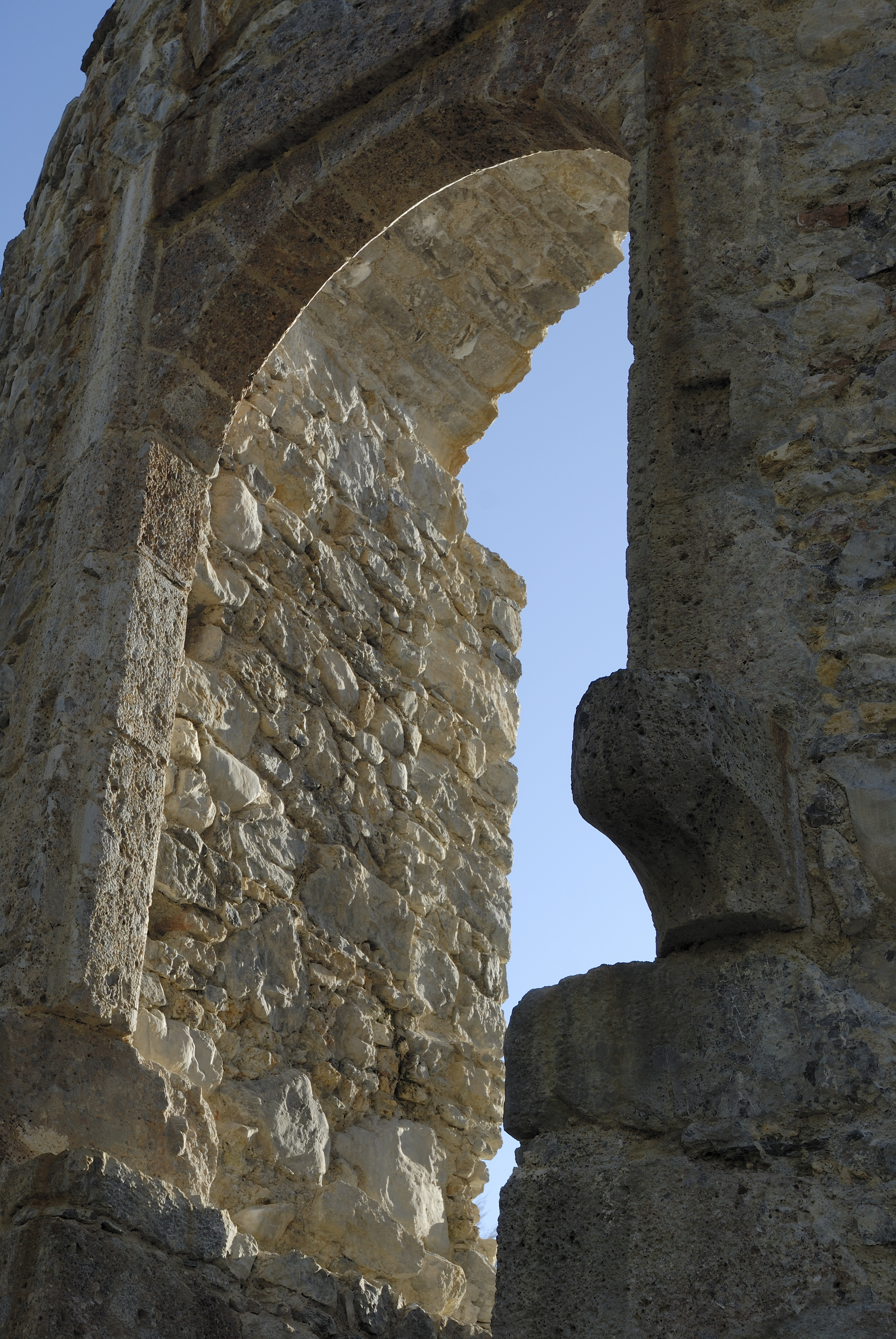 Burgruine in Thaur, Detail Fenster